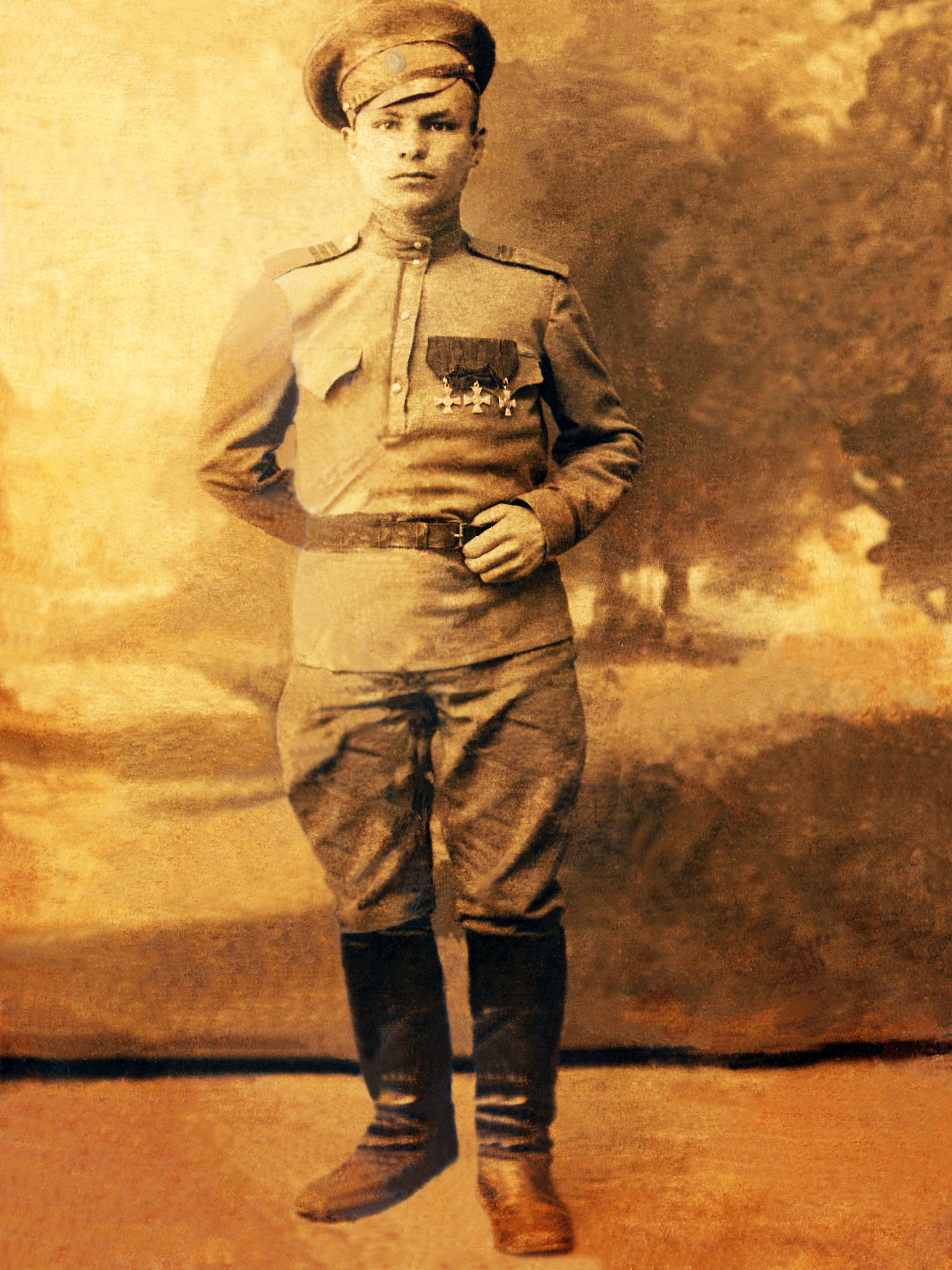 Світлина часів Першої світової війни